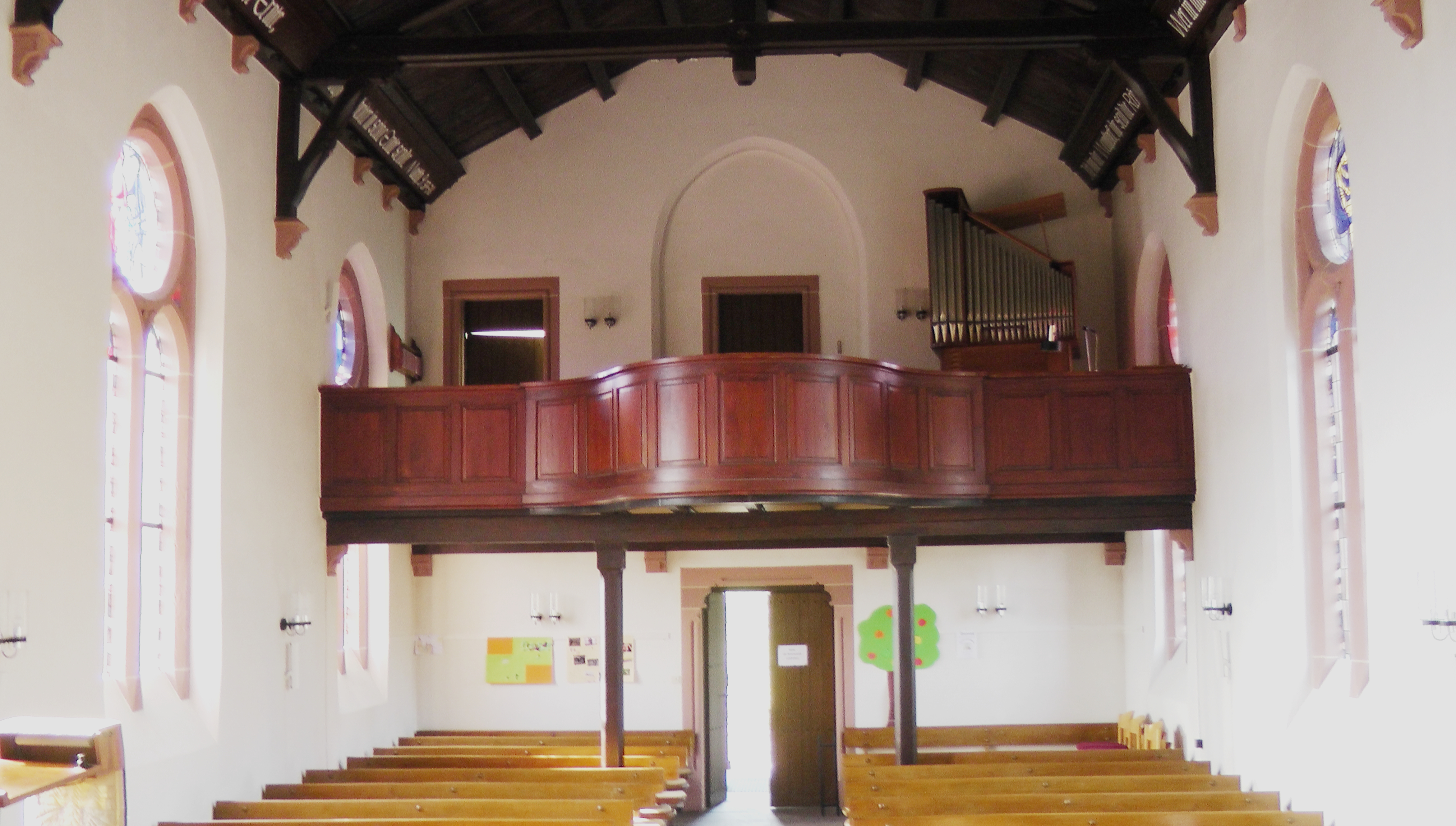 Evangelische Kirche Saarburg Orgelempore